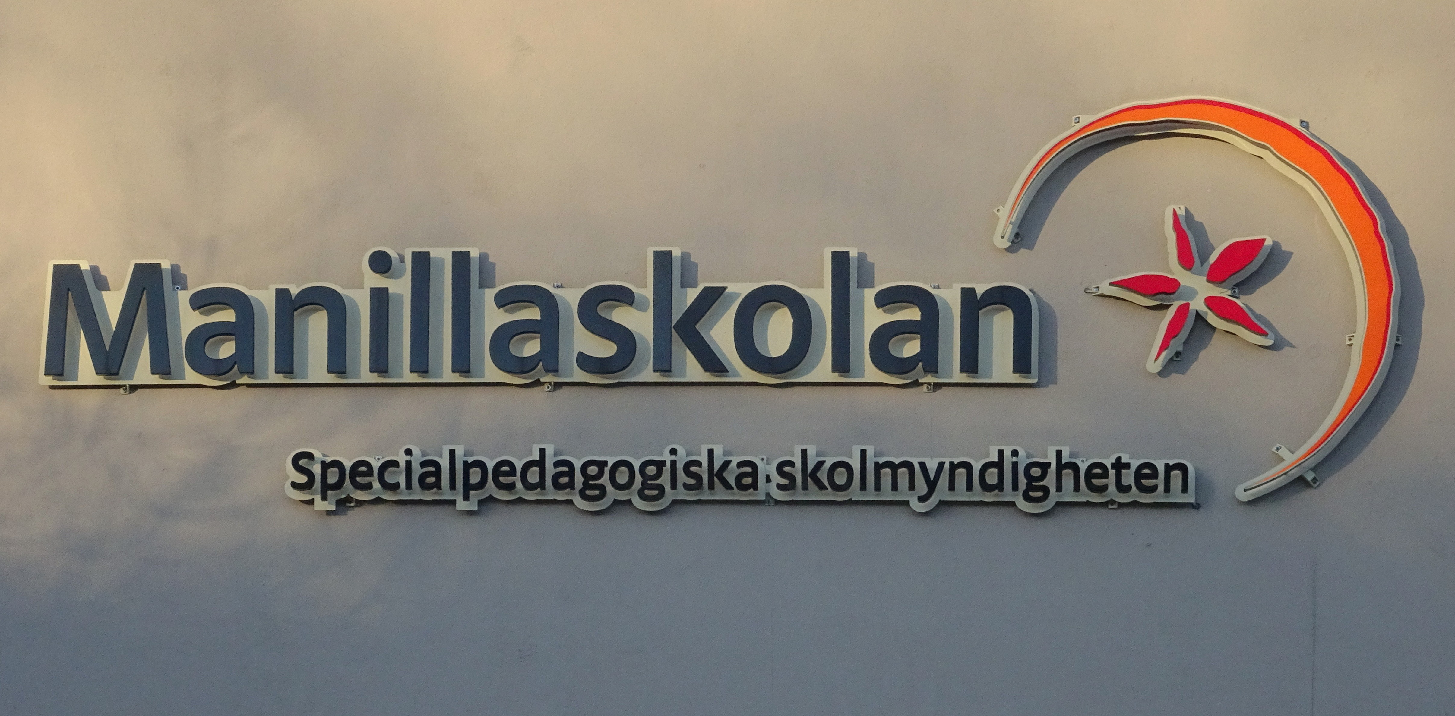 Manillaskolan, Kungsholmen, Campus Konradsberg